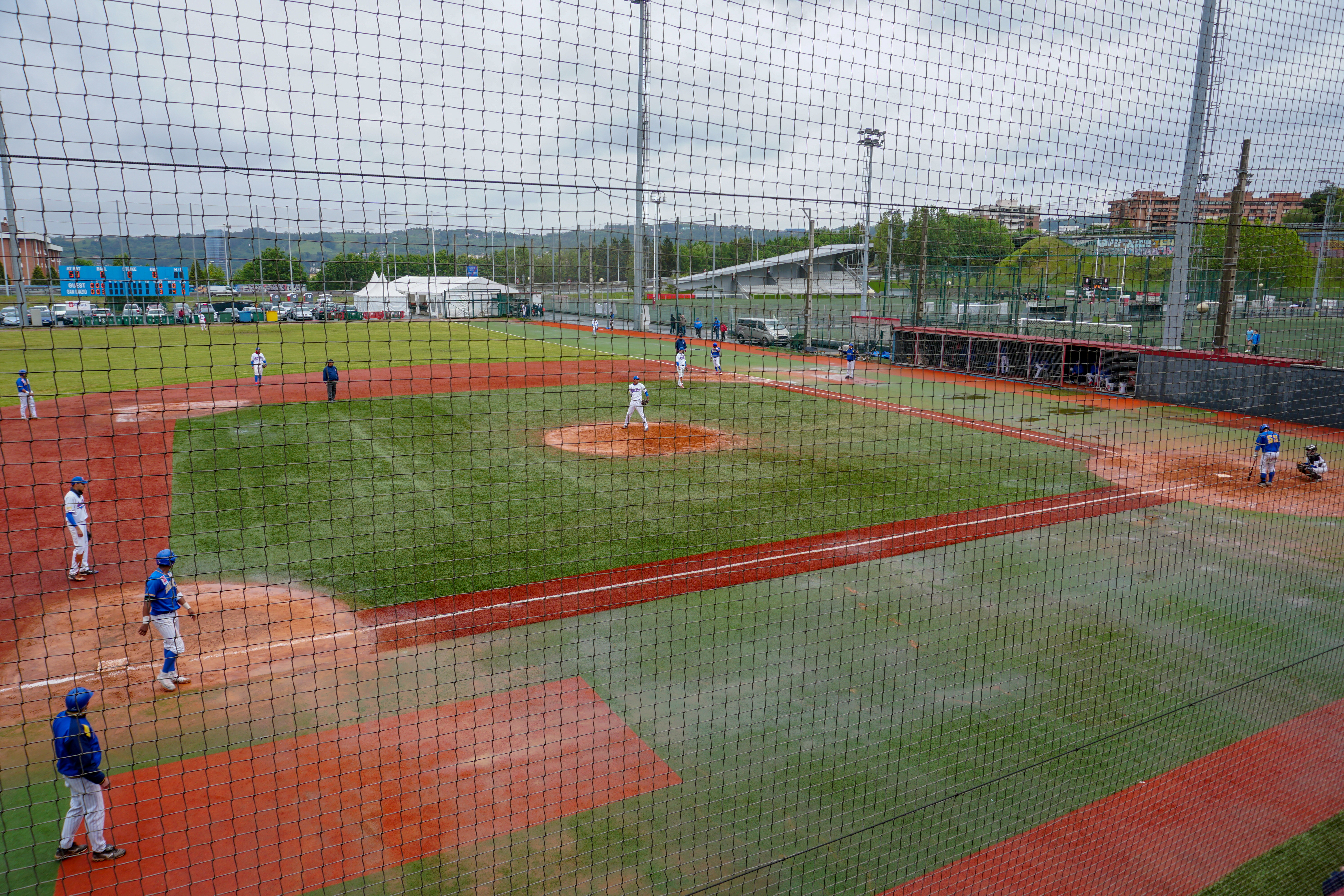 Final de la Copa del Rey de Béisbol 2019 entre Sant Boi y San Inazio